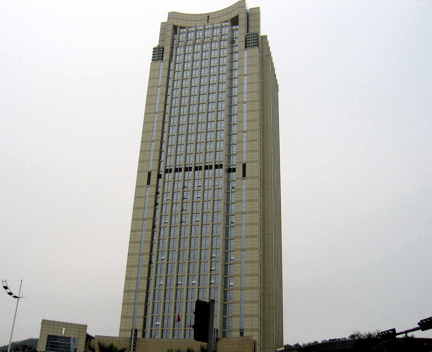 吉大国税大厦